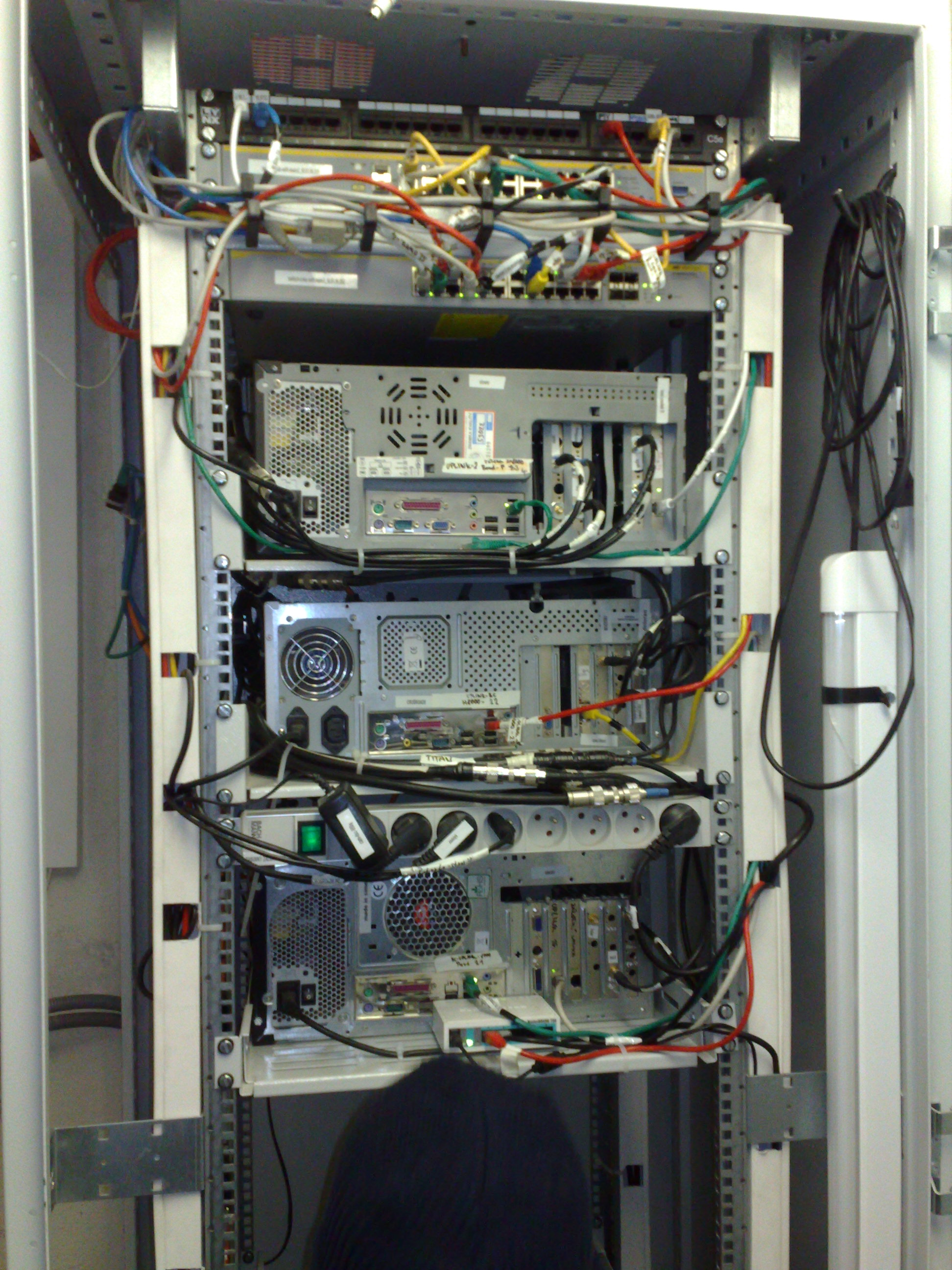 Pohled ro racků s řídicím serverem pro zajištění QoS pro internetového poskytovatele.